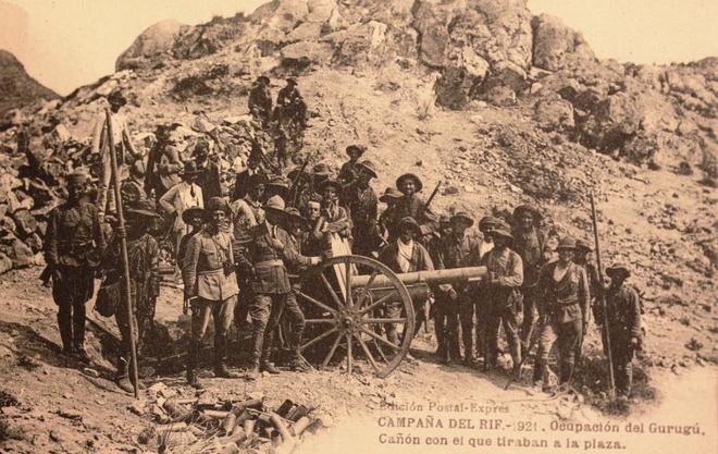 Postal de la collección "Guerra del Rif" de Edición Postal-Express, publicada por Hauser y Menet. Muestra tropas españolas en el monte Gurugú junto a un cañón de campaña Schneider modelo 1906. El cañón, reglamentario en el Ejército español, fue capturado por los rebeldes del Rif y usado para atacar las posiciones españolas en los alrededores de Melilla. El 29 de septiembre de 1921 tropas españolas tomaron el Gurugú y recuperaron el cañón.